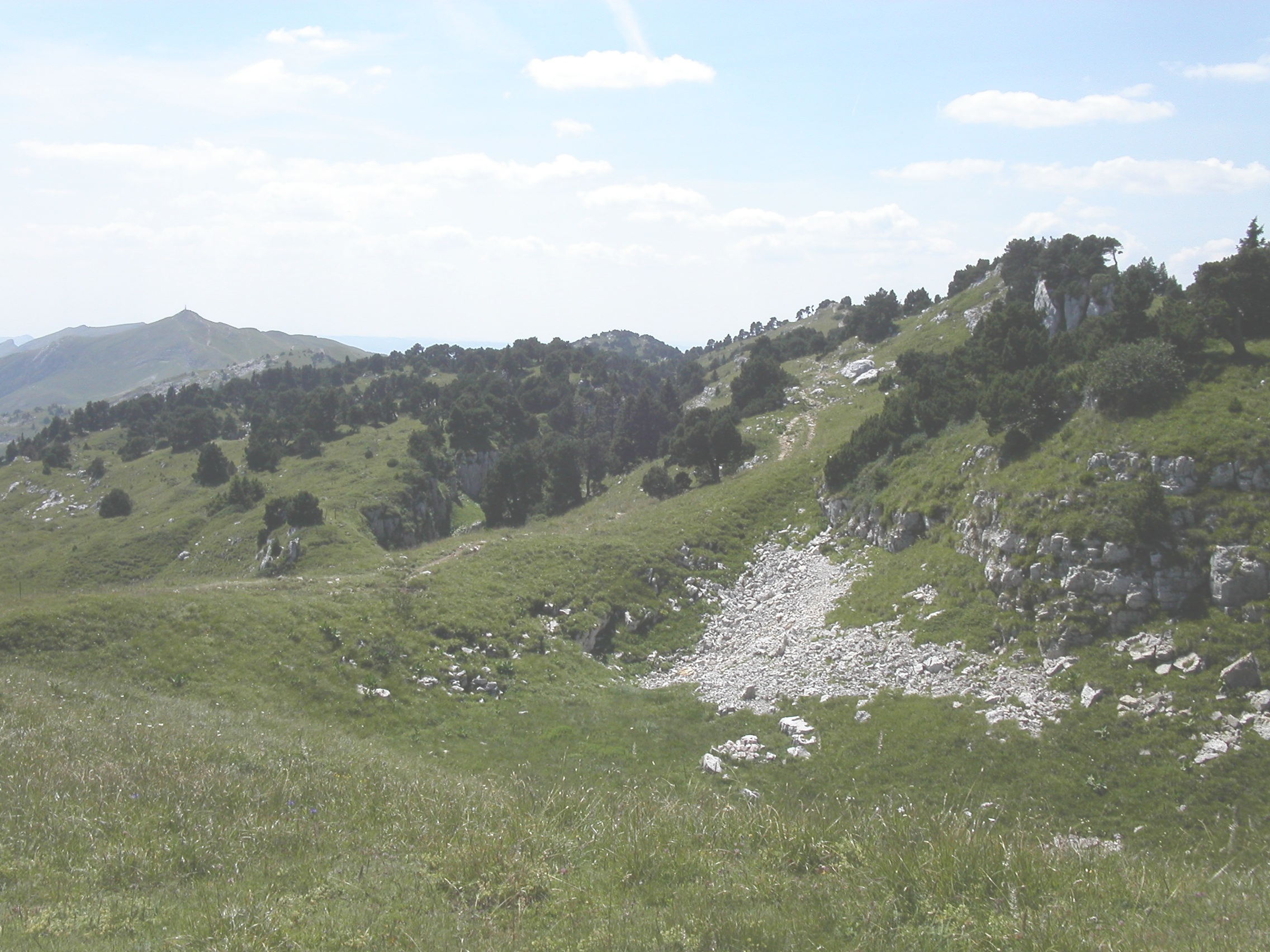 Le sommet du Crêt de la Neige avec le sommet du Reculet à gauche en arrière-plan Auteur : Utilisateur:Marc Mongenet Licence : GFDL